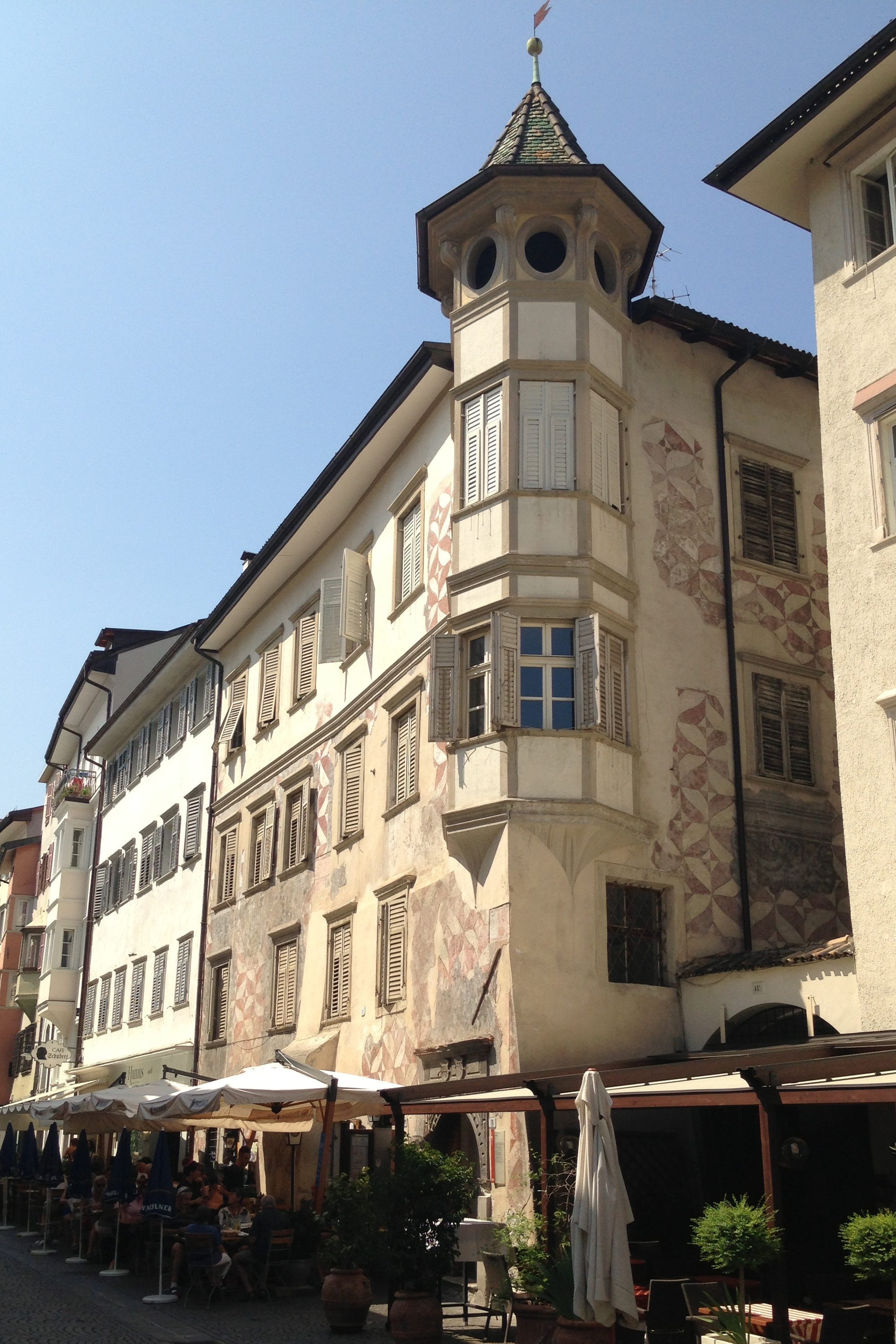 Troyburg in Bozen (Südostansicht)